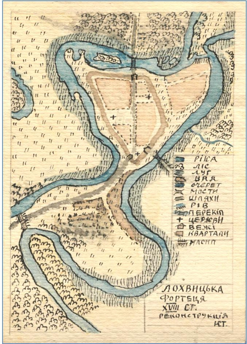 План Лохвицької фортеці XVII ст.,розроблений Тимофієм Яковичем Крестінським(перший директор Лохвицького краєзнавчого музею)